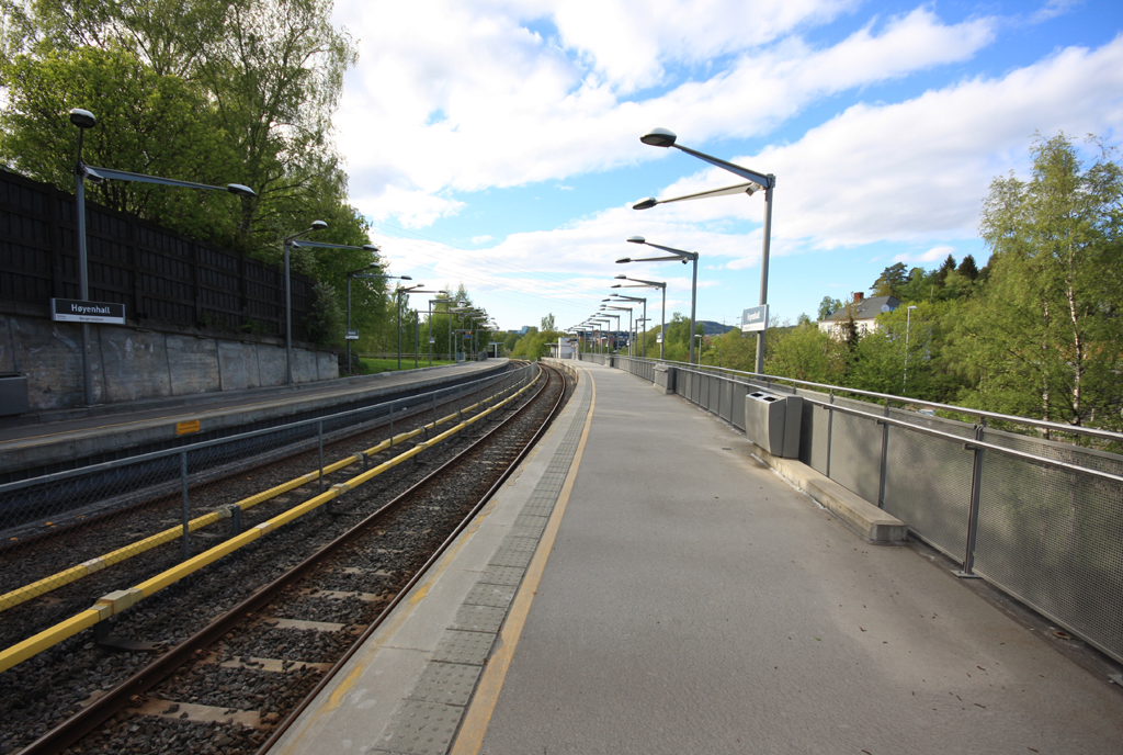 Høyenhall T-banestasjon. Fra sør-østlig endedel på Spor 2. Mot Brynseng.